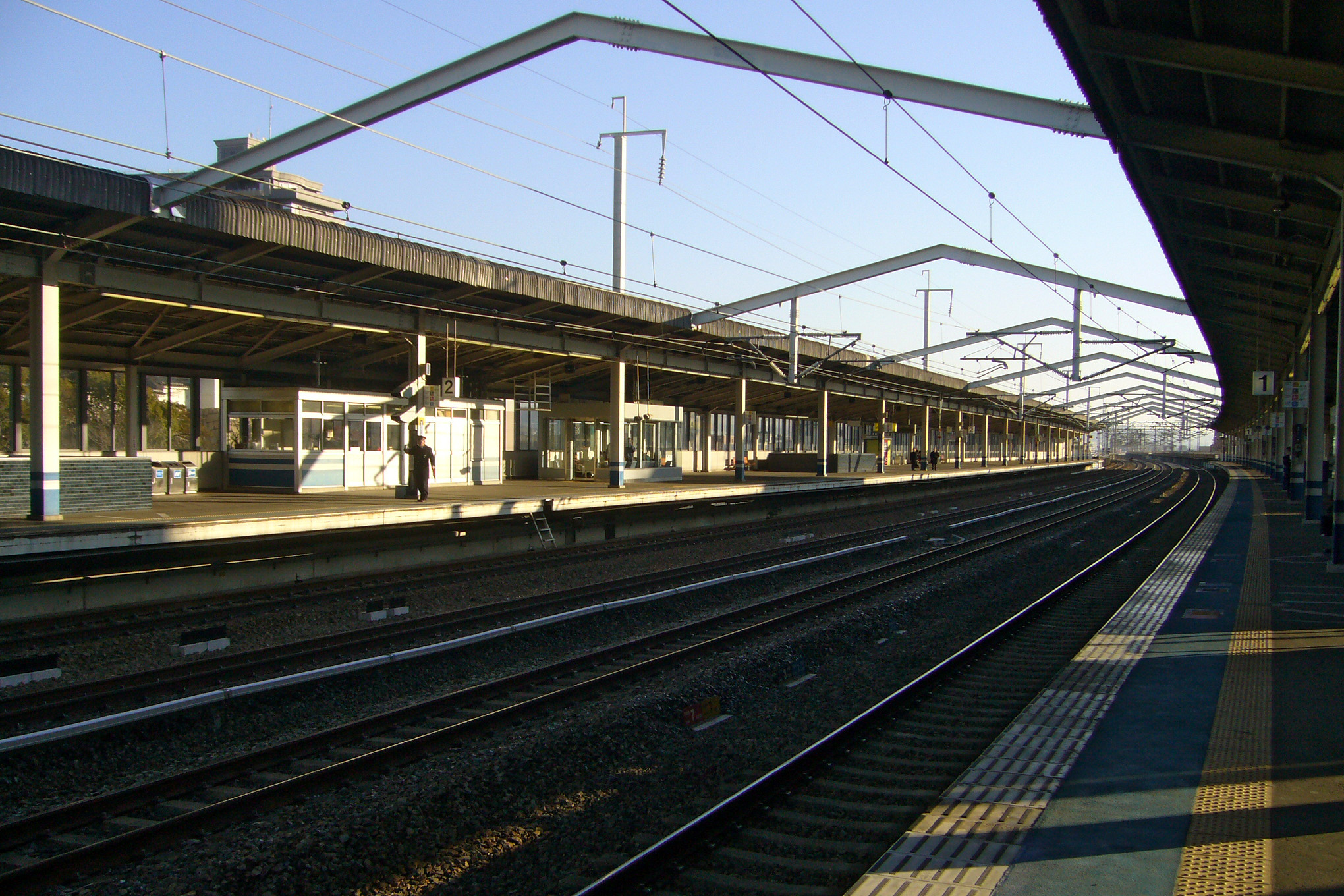 the Fukuyama Station in Fukuyama, Hiroshima, Japan